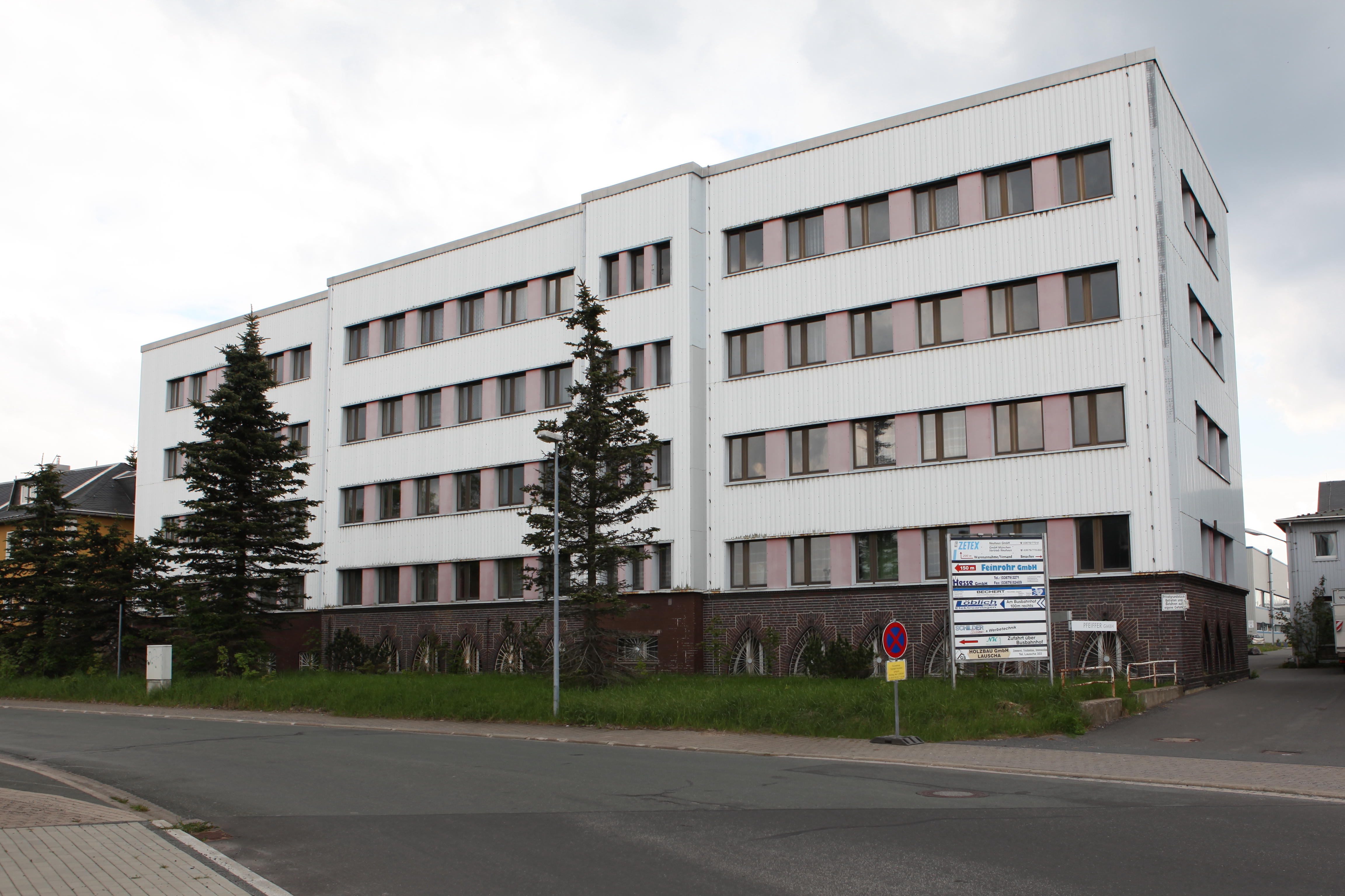 Verwaltungsgebäude Röhrenwerk Neuhaus am Rennweg